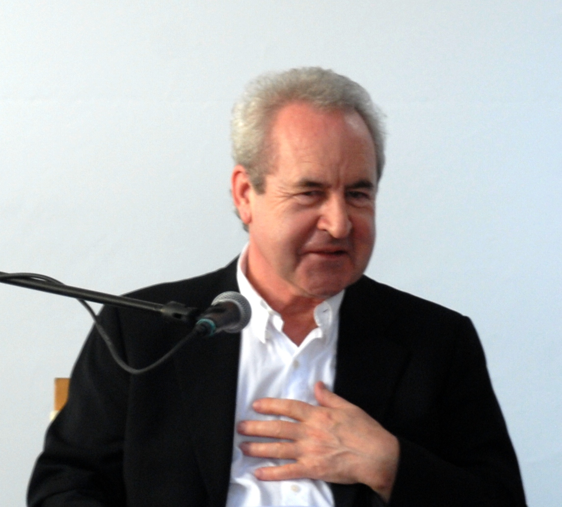 John Banville